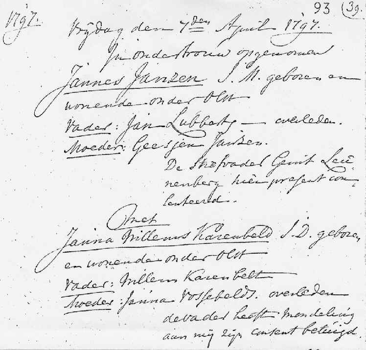 Trouwakte Jannes Willighagen